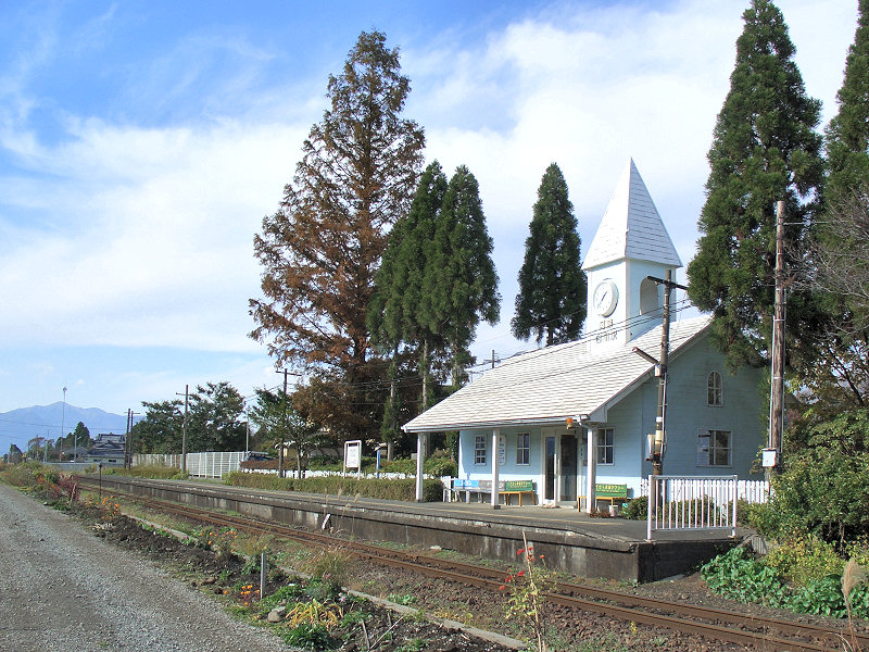 南阿蘇鉄道 阿蘇白川駅 ホーム 奥が立野駅方面、手前が高森駅方面。 撮影者/著作者/著作権保有者 : MK Products (本人がアップロード) 撮影日 : 2006/11/21 阿蘇白川駅用にアップロードした画像です。良い画像があれば別の画像に変えてください。